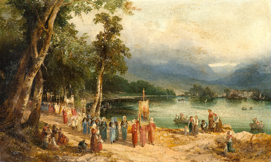 Processione, olio su cartone, cm 32 x5 1, firmato, collezione privata